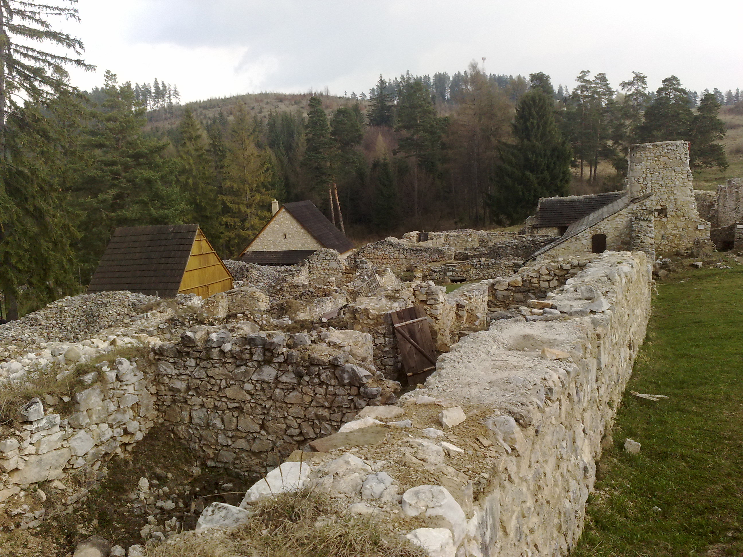 Klastorisko, Slovak Paradise